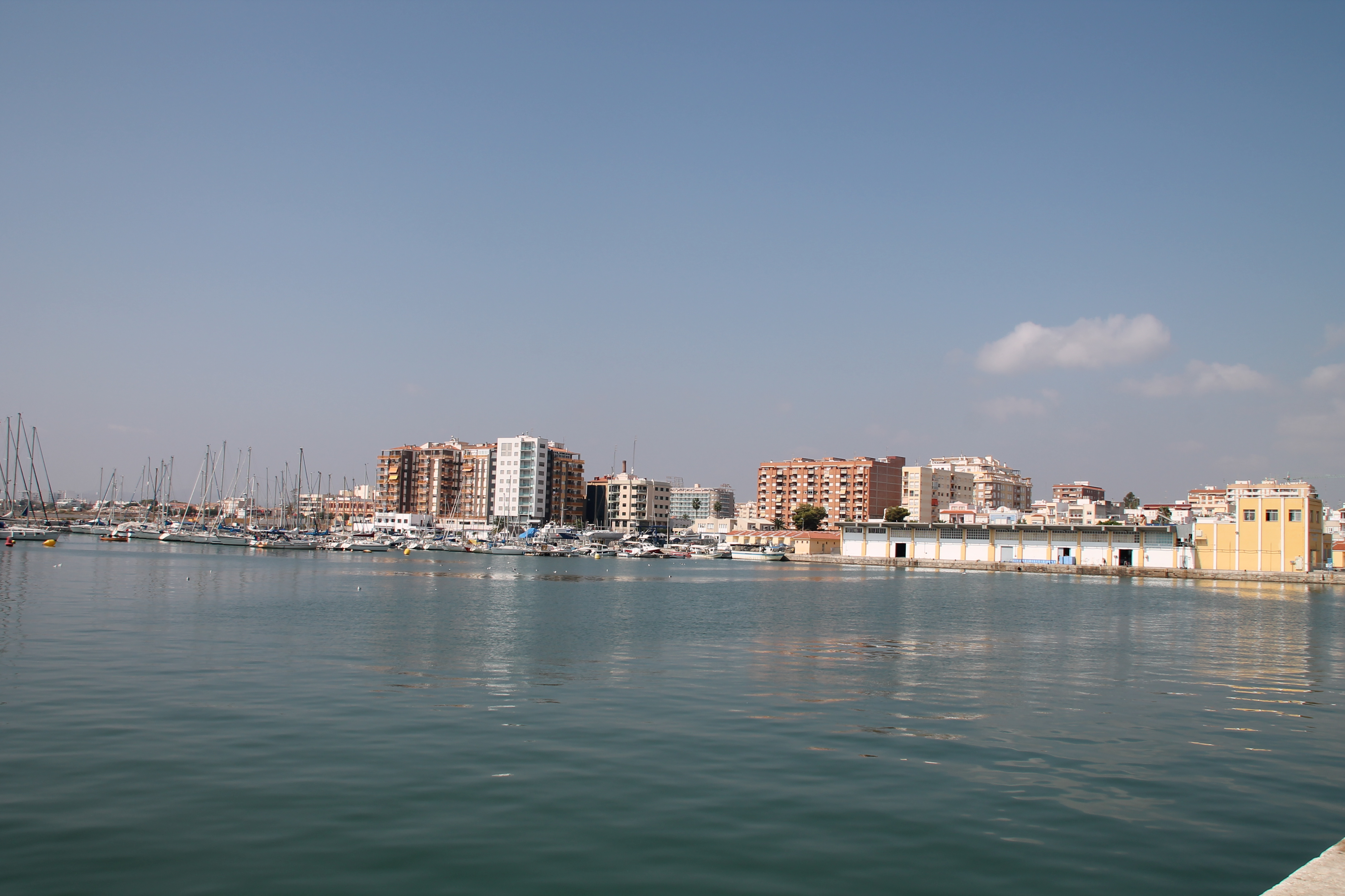 Port de Vinaròs 03.138-031.